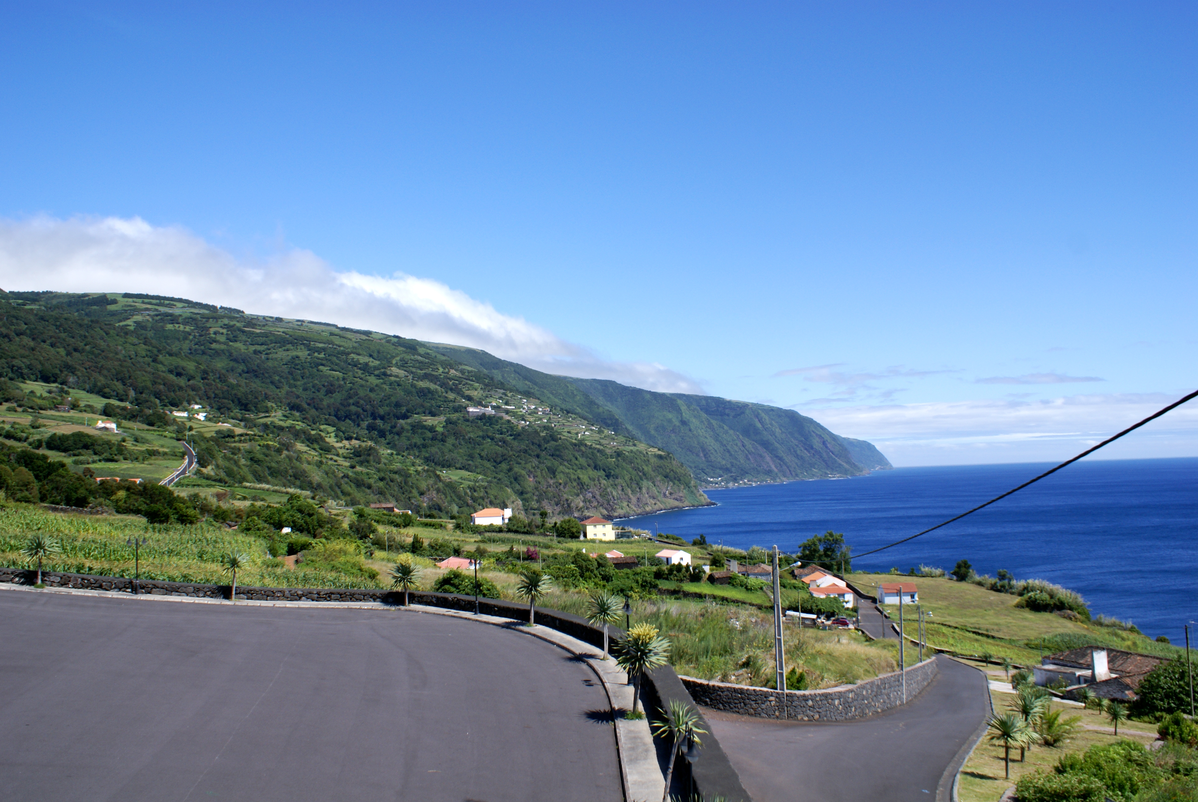 Ribeira Seca, paisagem, Calheta, ilha de São Jorge, Açores